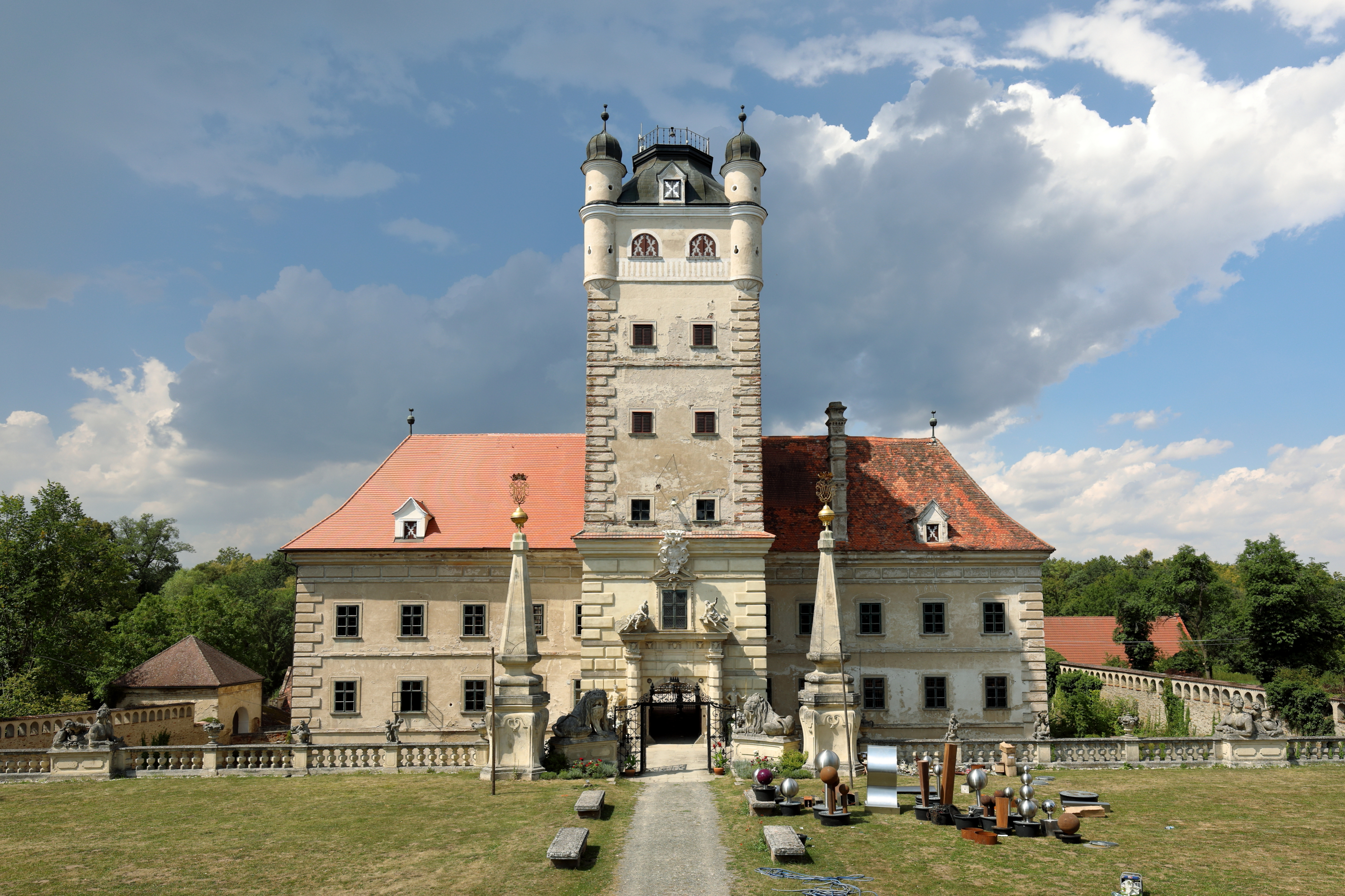 Südostansicht des Schlosses Greillenstein in Greillenstein, ein Ortsteil der niederösterreichischen Gemeinde Röhrenbach. Das vierflügelige Renaissanceschloss mit vorgelagertem monumentalem Turm wurde um die 16./17. Jahrhundertwende unter Einbeziehung älterer Teile errichtet.